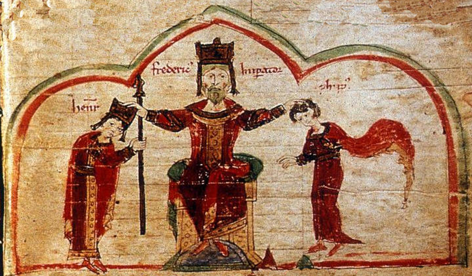 Fridrich Barbarossa a synové